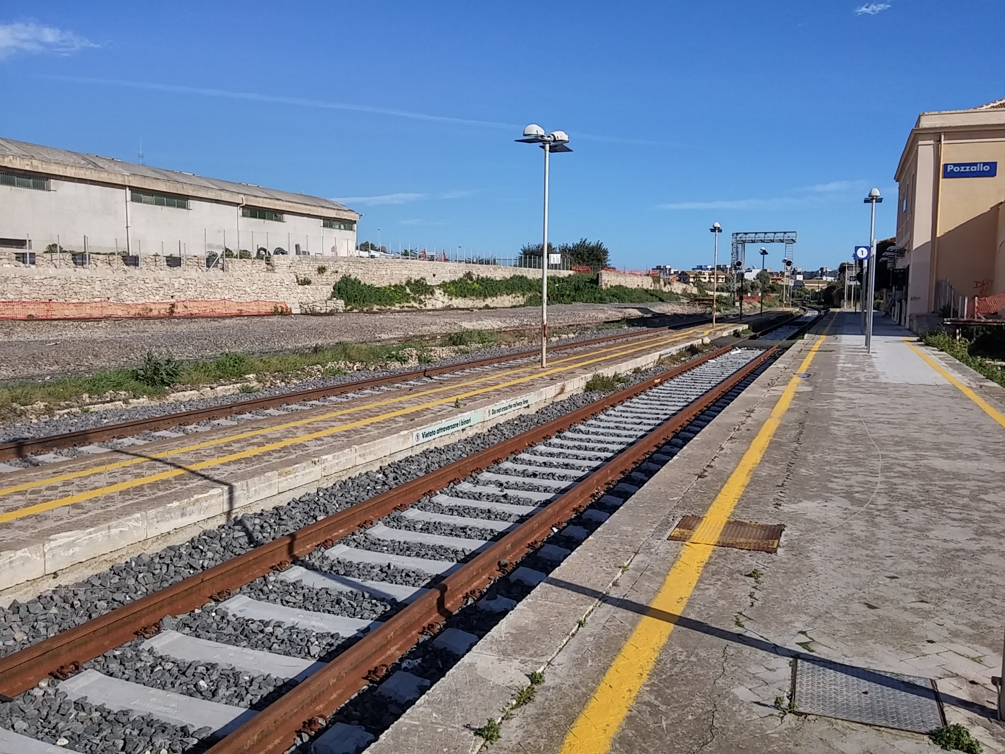 I binari alla stazione di Pozzallo a lavori terminati